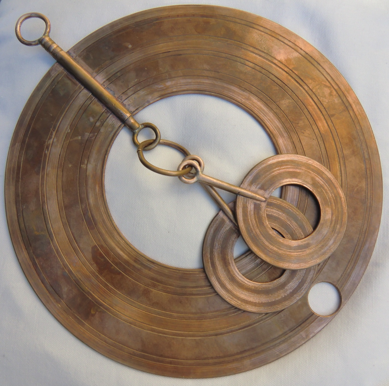 Reproduktion des Tintinnabulums vom Eichenborn-Depotfund in Wallerfangen im Jahre 1850 (Anfertigung: S. Michelbacher 2018).